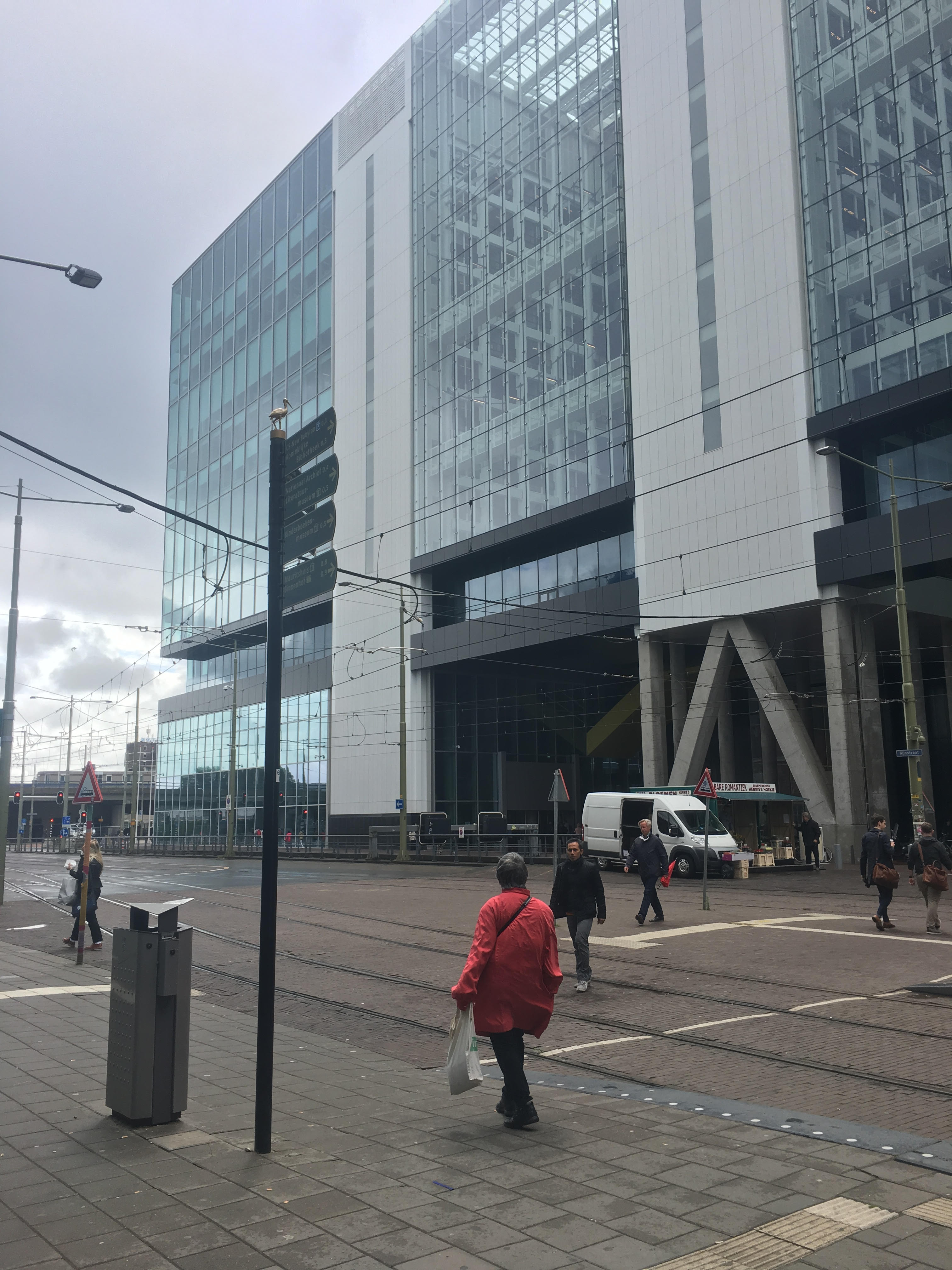 Rijkskantoor ministerie van Buitenlandse Zaken, ministerie van Infrastructuur en Milieu, Immigratie- en Naturalisatiedienst (IND), Centraal Orgaan Opvang Asielzoekers (COA) en de Dienst Terugkeer & Vertrek (DT&V) aan de Rijnstraat 8 in Den Haag. Voorheen was dit het VROM-gebouw.